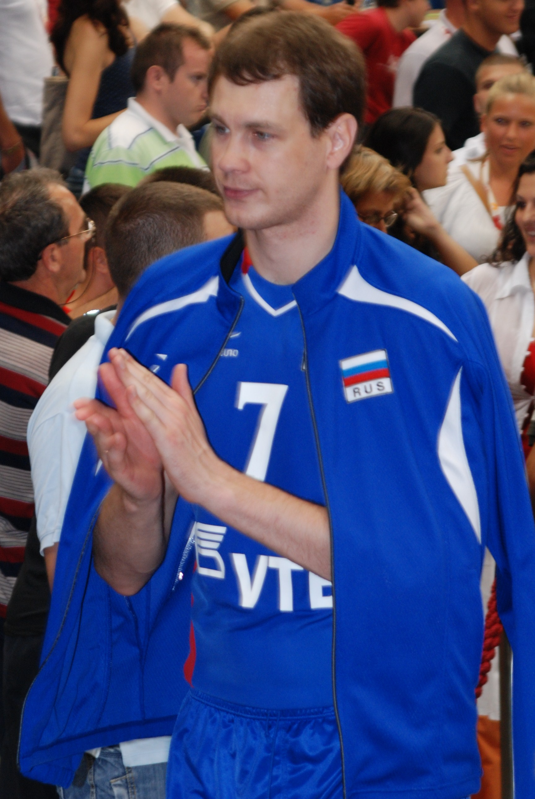 Russian volleyball player Aleksey Kazakov